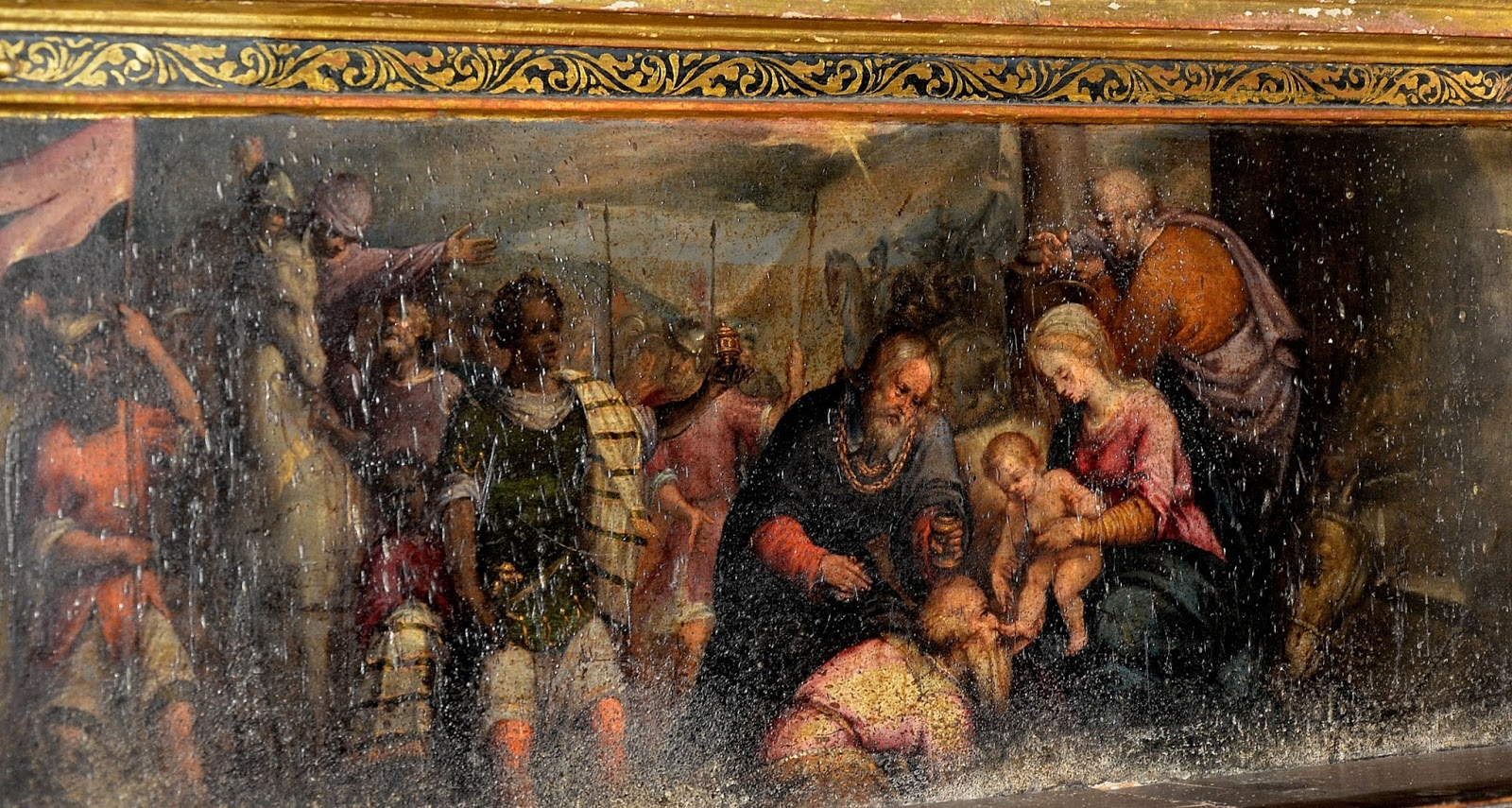 retablo de la capilla de los Mártires, Coegiata de Santa María, Borja.